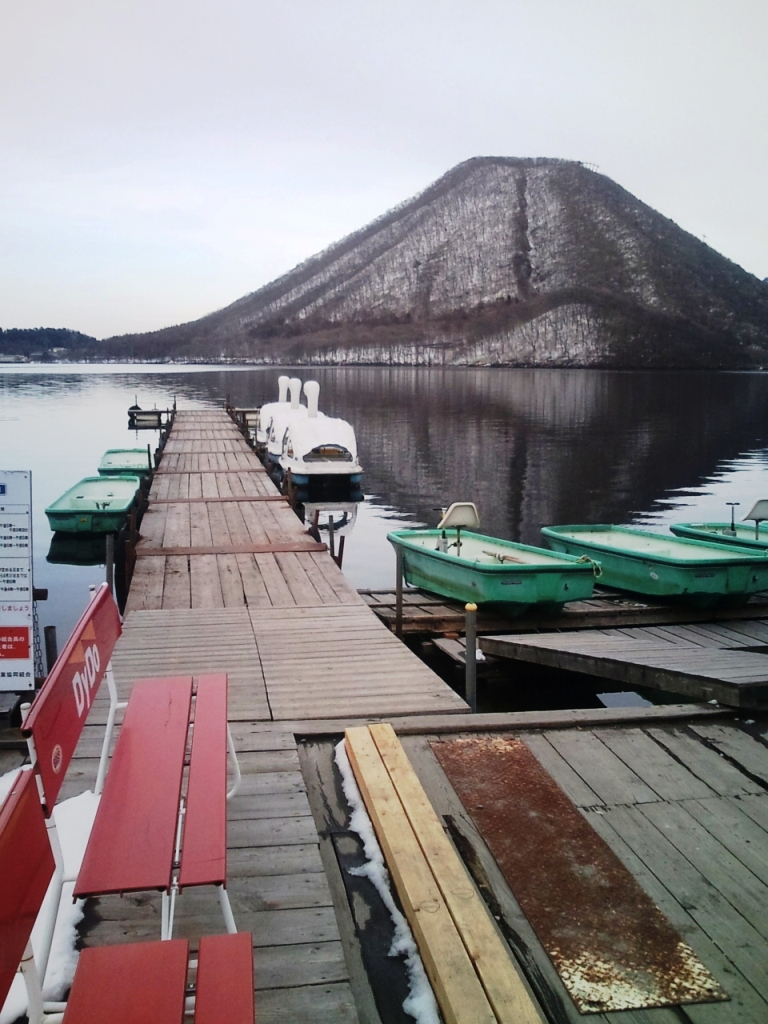 榛名山 March,2010